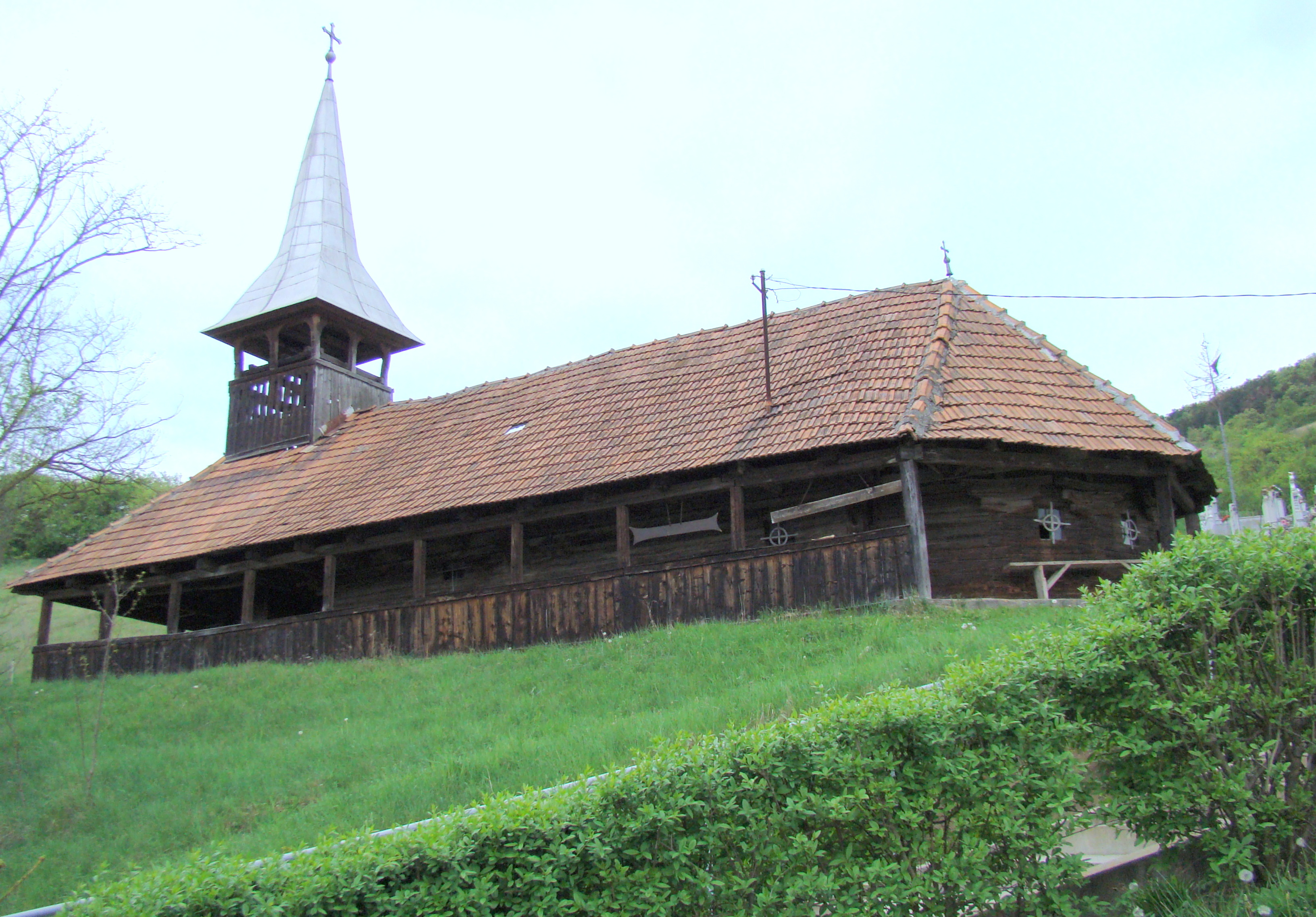 Biserica de lemn din Băgău, judeţul Alba.